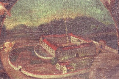 Kloster Habstahl, Ansicht von 1671, Ausschnitt aus dem Hochaltargemälde von Matthäus Zehender